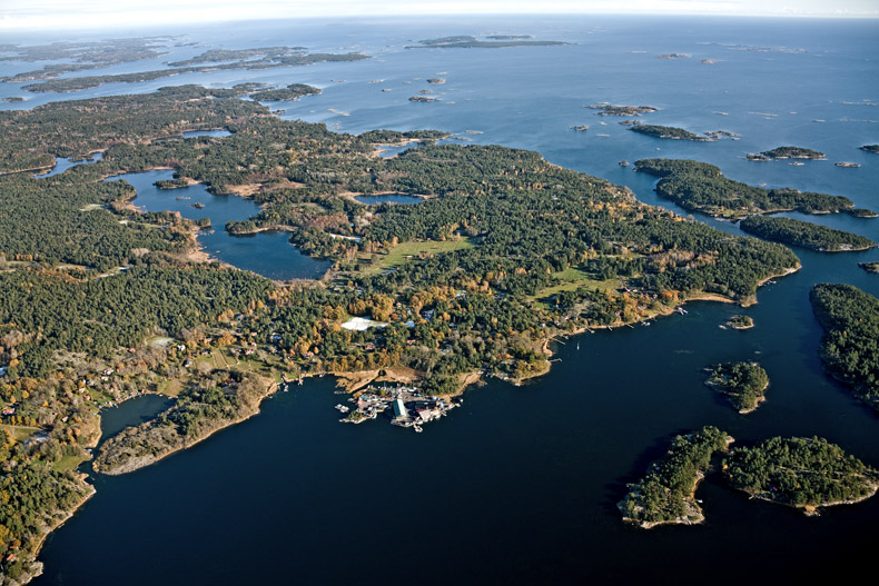 Mot NO. Solberga i bildens mitt, till höger Söderby. Motiv: Runmarö Nyckelord: Flygbilder Kategori: Kust- och skärgårdsmiljöMot NO. Solberga i bildens mitt, till höger Söderby.